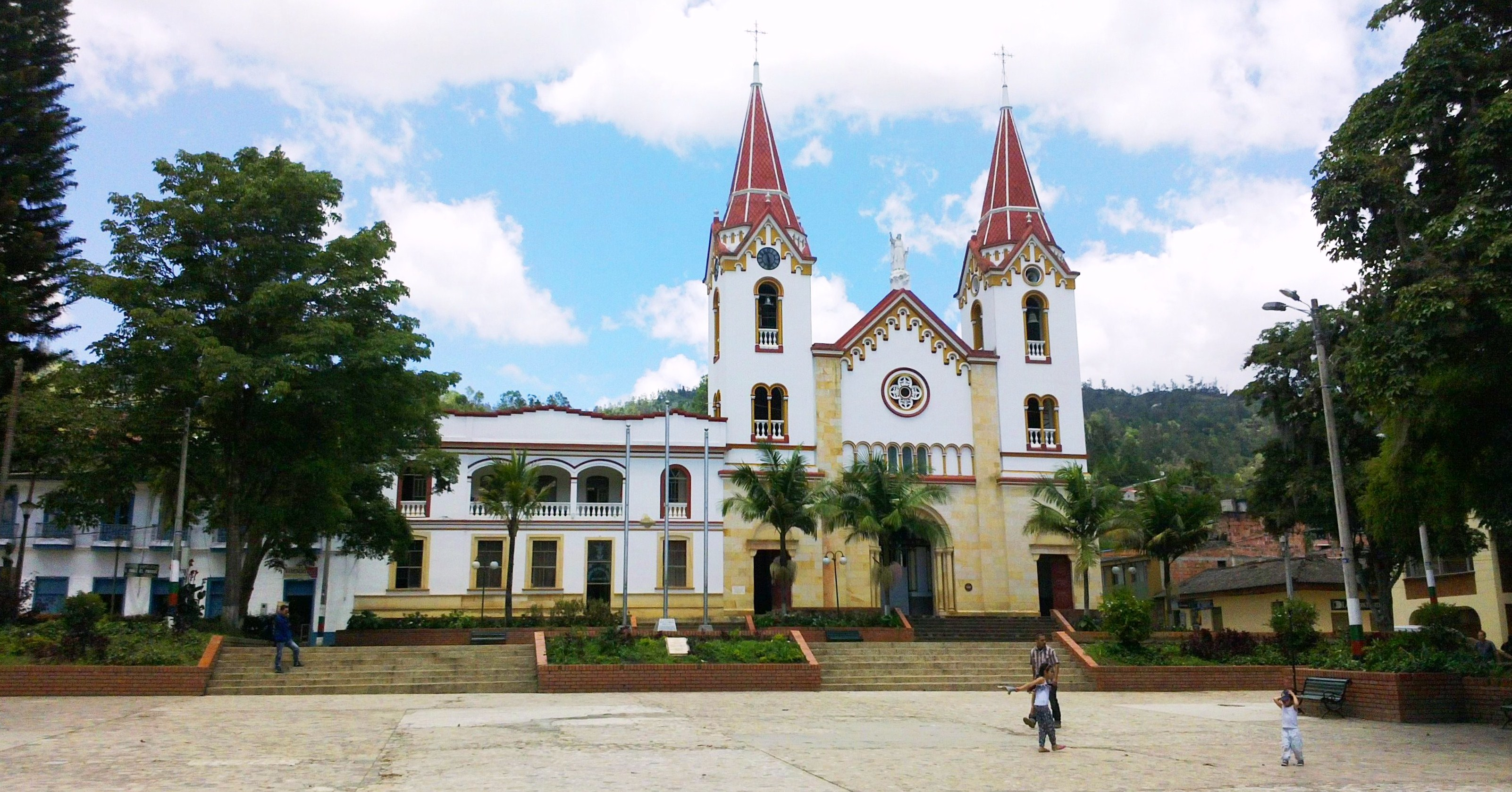 Ubicación: GACHETA, CUNDINAMARCA tarde en Gacheta Cundinamarca, parque principal e iglesia.